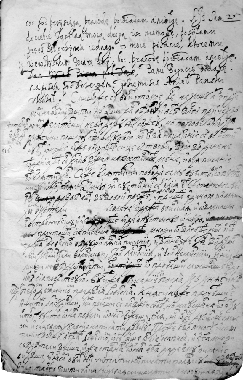 Собственноручные записки Петра Могилы (1628—1632 гг.) Лист, где указан Іоаннъ Левковскій (ІР НБУВ. — Ф. 312. — № 367/676 С. Лист 25).